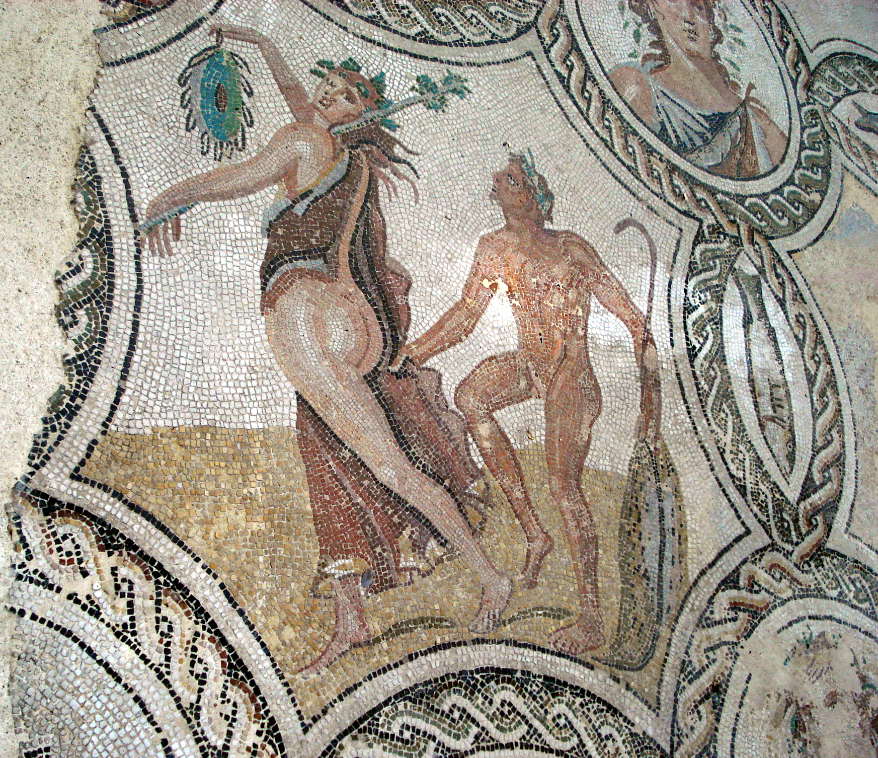 Menade e satiro. Dettaglio dal "Mosaico delle Stagioni", di epoca romana, da Palermo. Museo archeologico regionale di Palermo, 28 settembre 2006. Foto di Giovanni Dall'Orto.